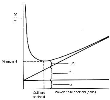 De Van Deemterplot laat zien dat er een minimun schotelhoogte bestaat bij een bepaalde elutiesnelheid.